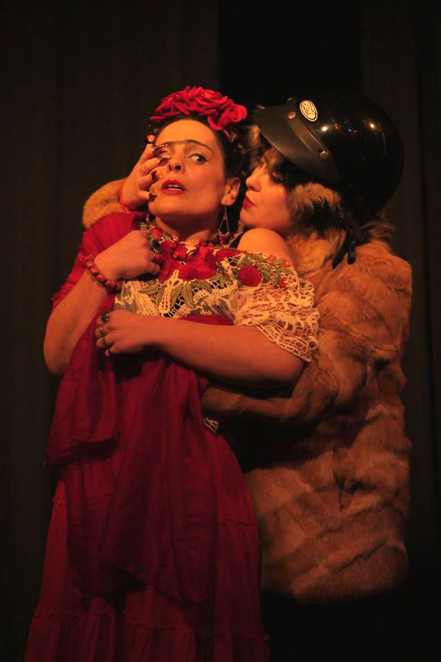 D. Mona apresenta Não Kahlo.